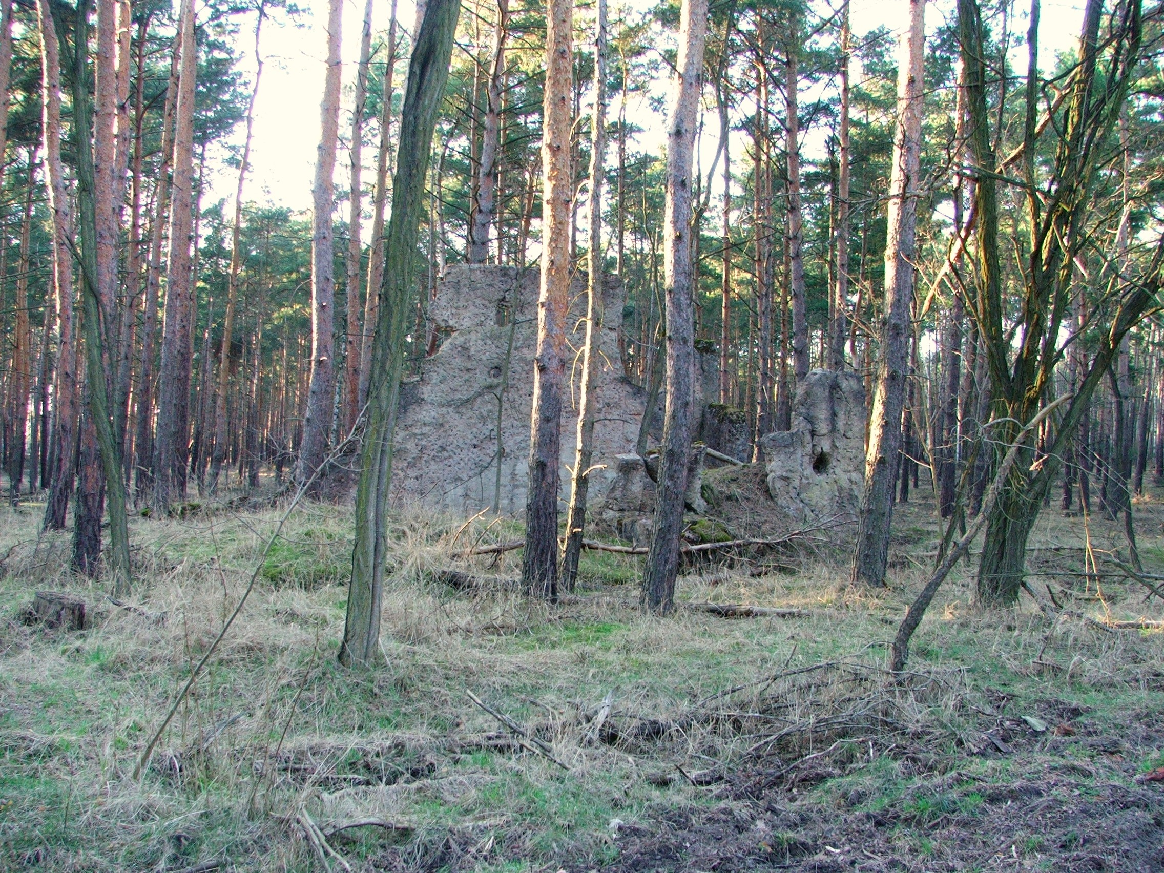 Bunkerrest des KZ Buchenwald, Außenstelle Schlieben in Berga bei Schlieben